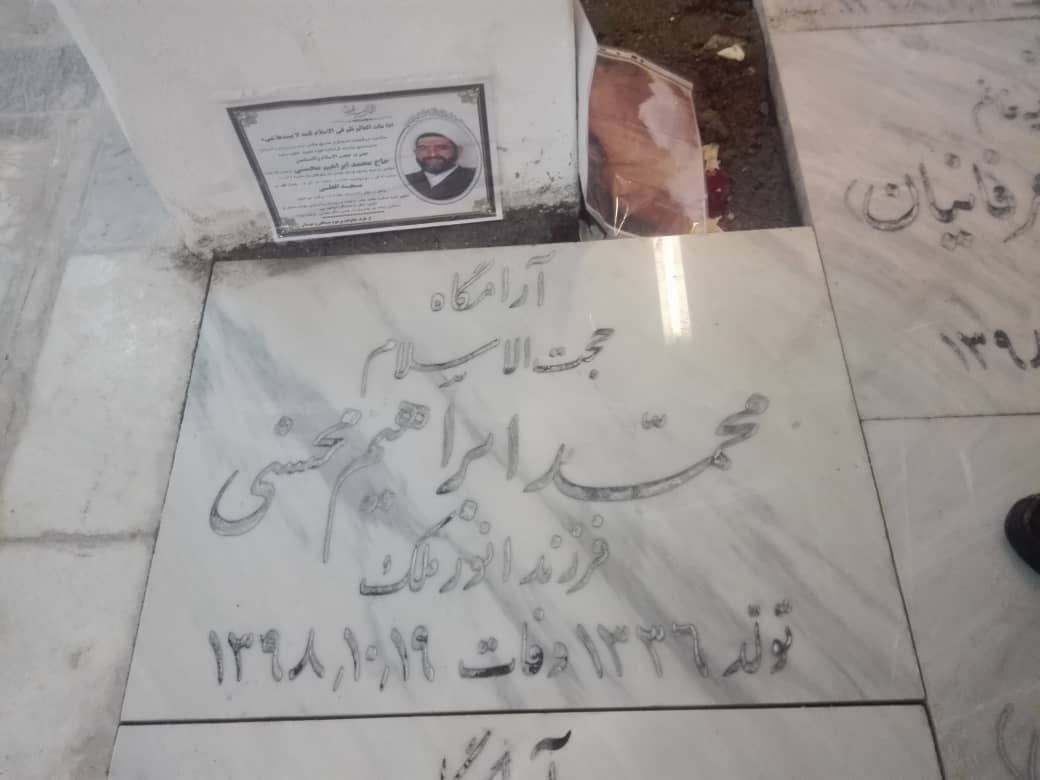 محمد ابراہیم محسنی کے قبر کی تختی